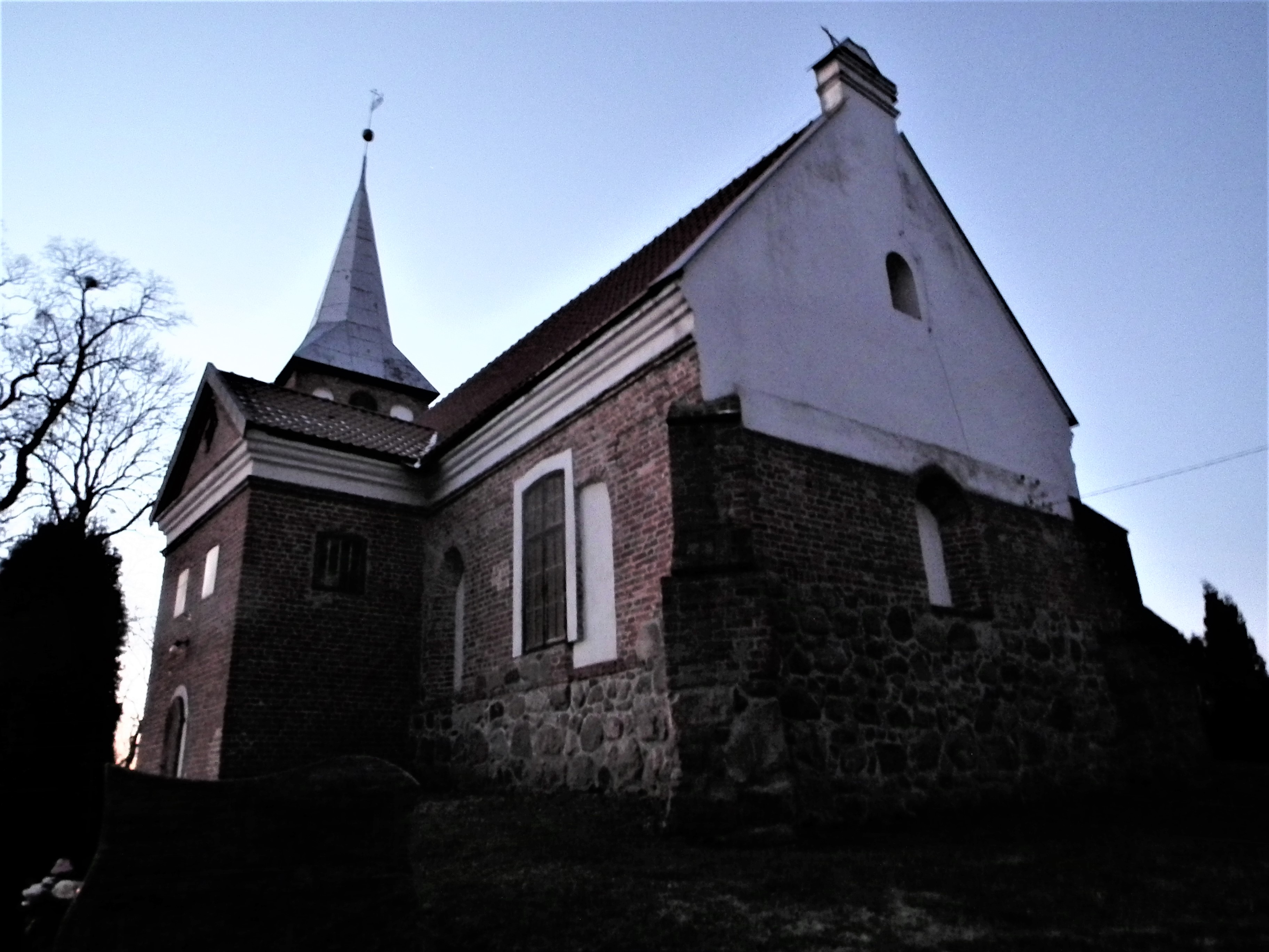 Kościół św. Piotra i Pawła w Starym Mieście w gm. Stary Dzierzgoń.